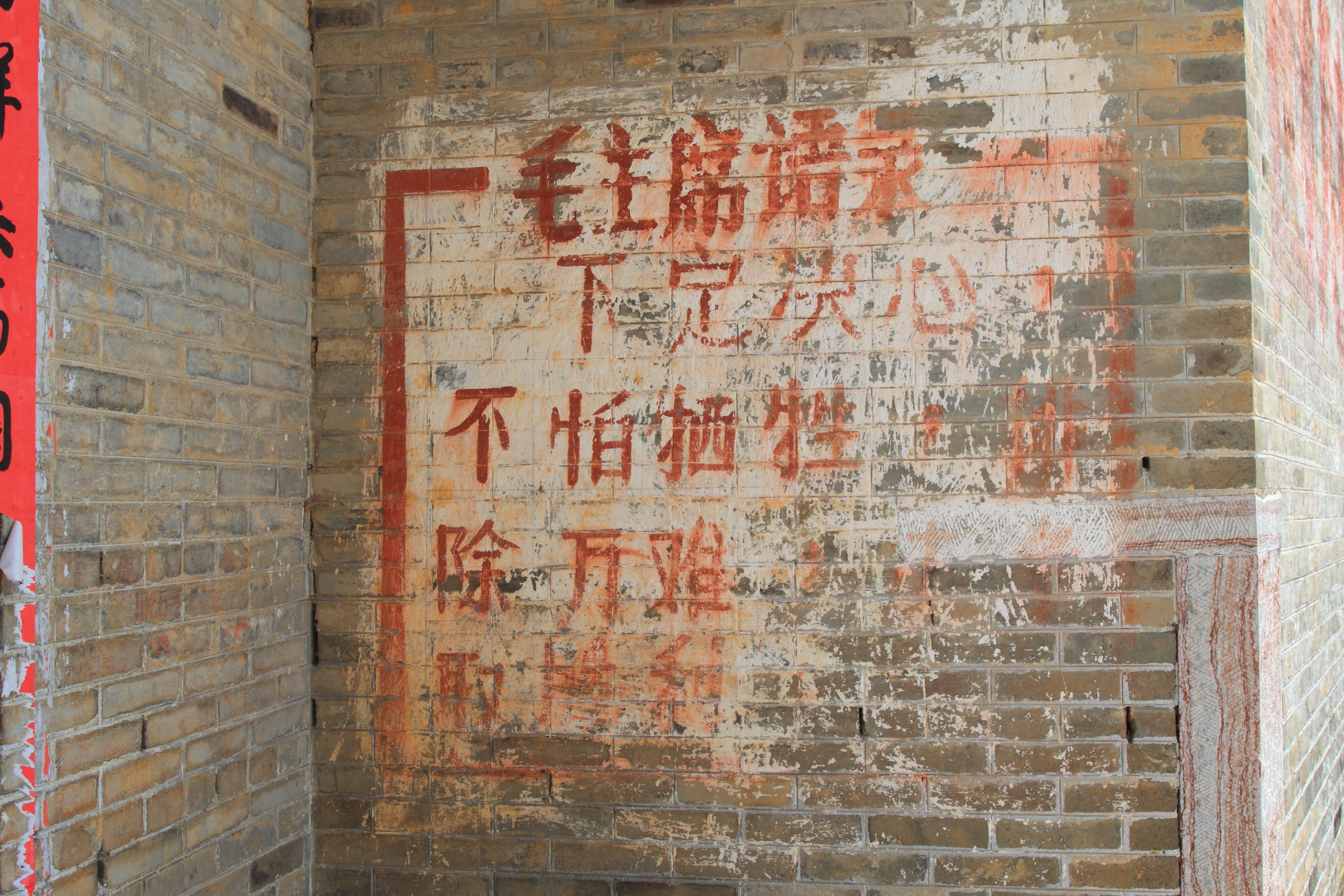 阳朔县白沙镇旧县村